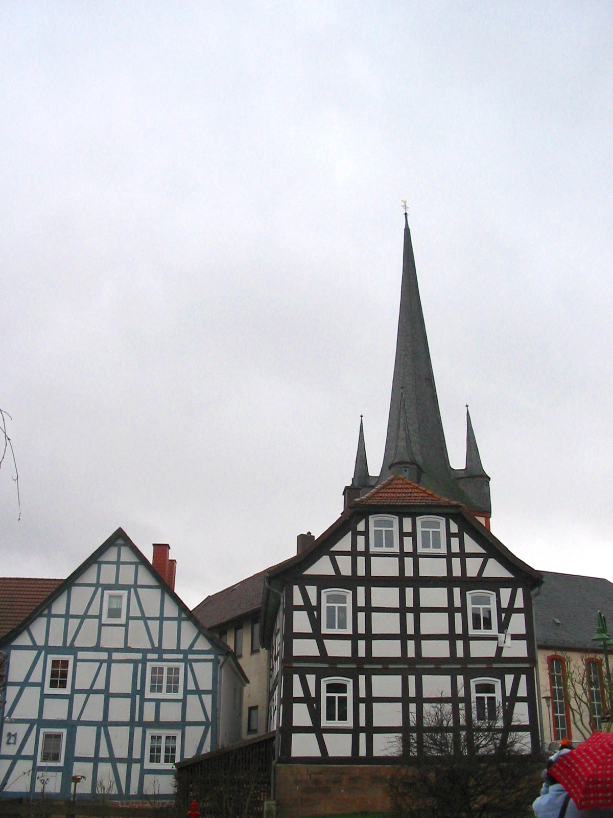 Ein Anblick, wie man ihn in Wartenberg oft antrifft. Seit dem hohen Mittelalter bis ins 19. Jahrhundert war der Fachwerkbau die am weitesten verbreitete Bauweise für Hochbauten nördlich der Alpen. Der Turm der ev. Kirche zu Angersbach ist in seinen ältesten Teilen über 500 Jahre alt.